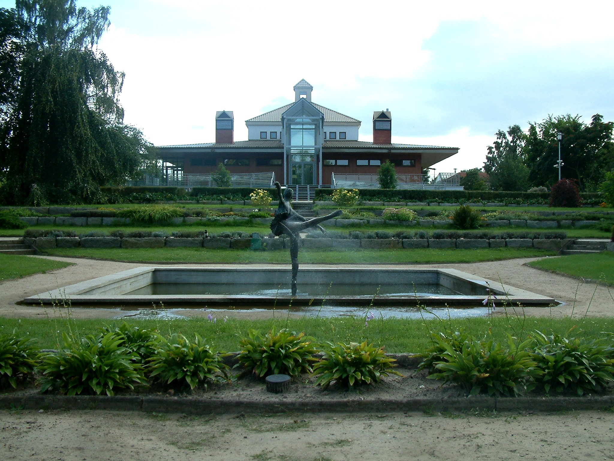 Botanical Garden in Poznań